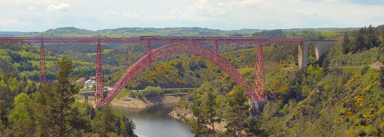 Deze foto is door mezelf gemaakt (beetlelaaf 2005) en is vrij te gebruiken voor iedereen